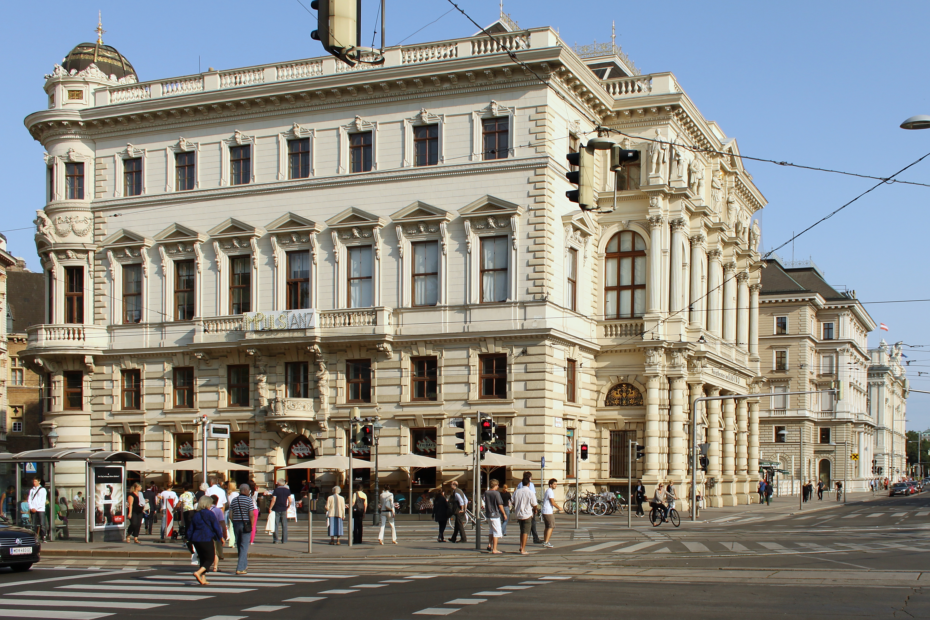 Ehem. Palais Erzherzog Ludwig Viktor, Burgtheater-Casino